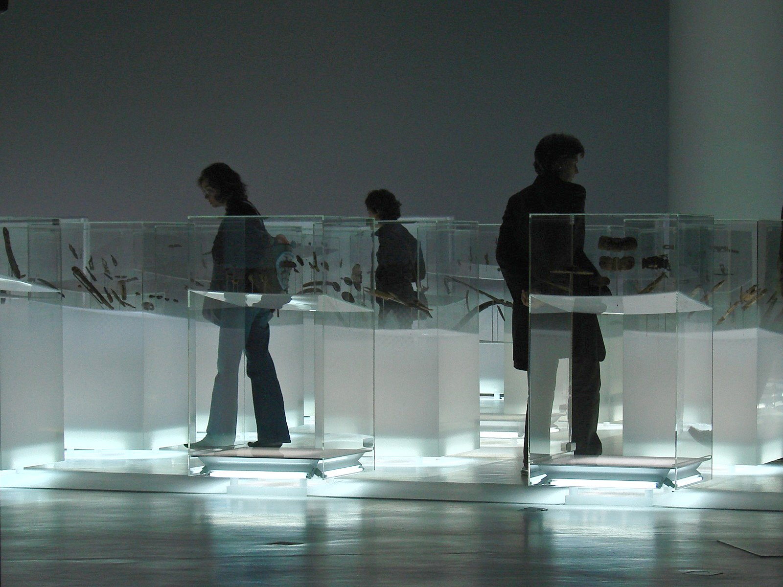 Espace central de l'exposition sur les 3 cultures de l'Arctique : Ekven, "Old Bering Sea", Ipiutak. Le parcours de l'exposition "Upside Down - Les Arctiques" au musée du Quai Branly est volontairement dénuée de commentaires. Elle invite, dit le dépliant de présentation, à une promenade sensorielle dans le monde polaire.